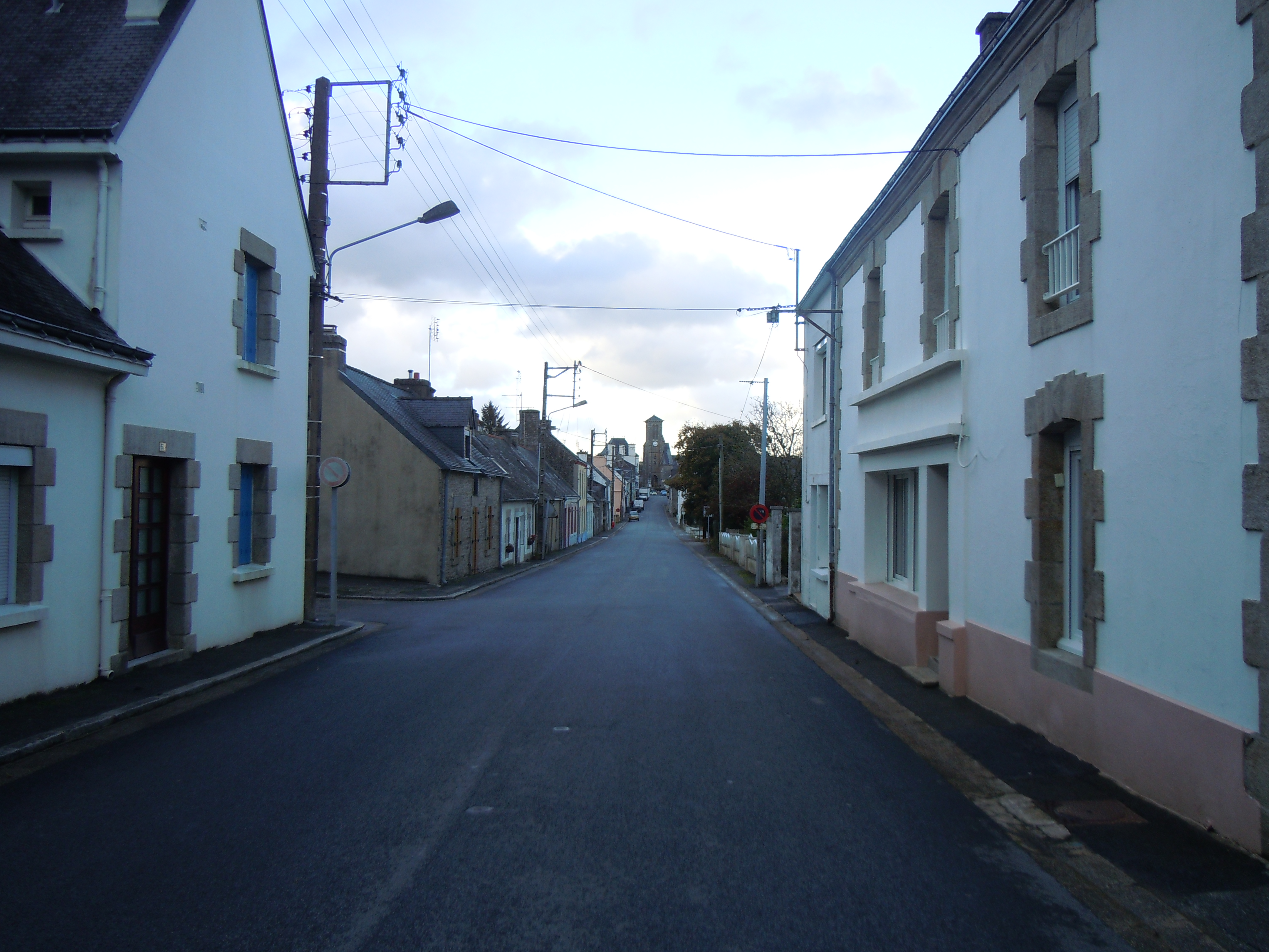 la rue principale du bourg de Priziac, département du Morbihan, France